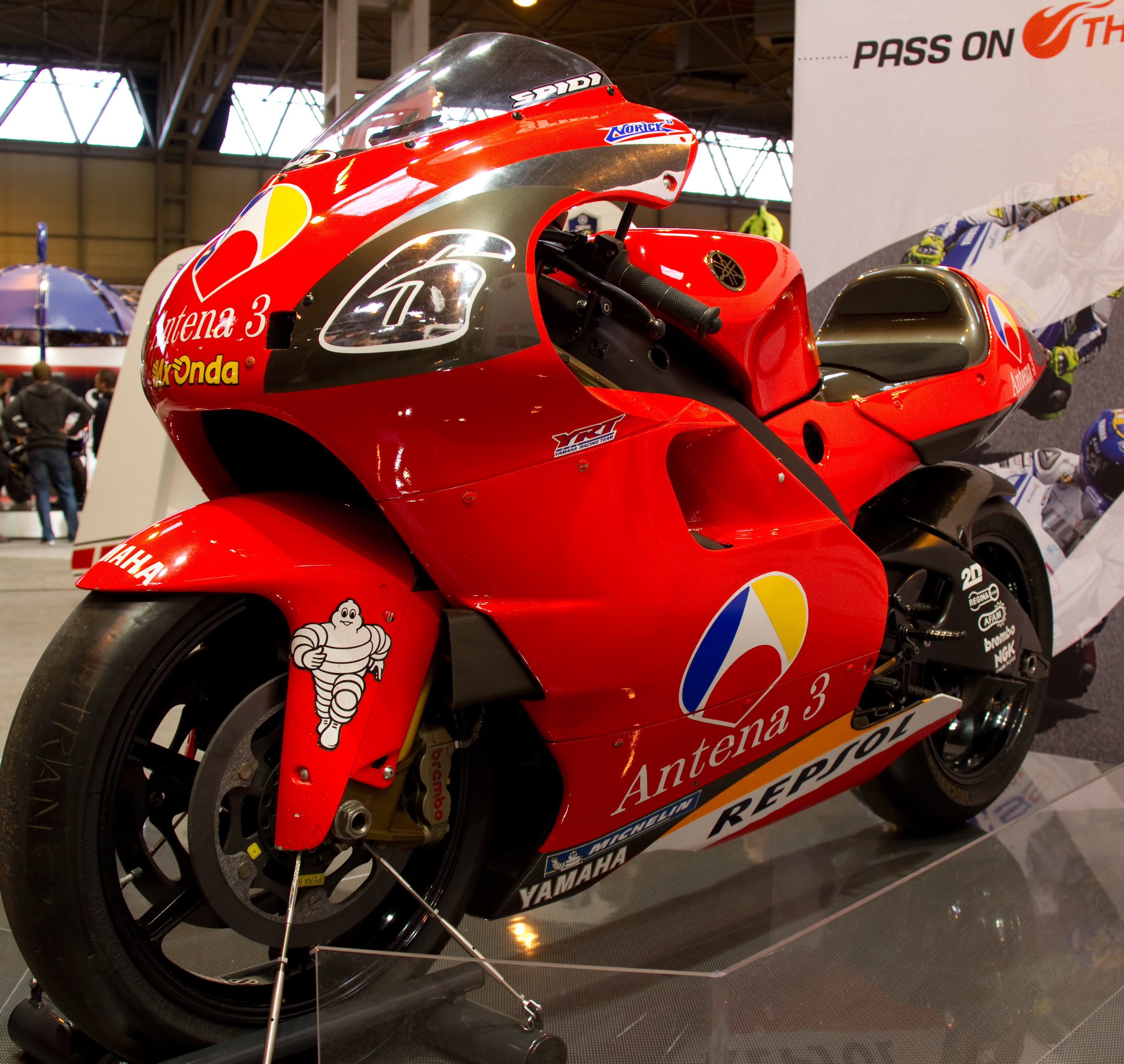 2001 Yamaha OWL6 YZR500